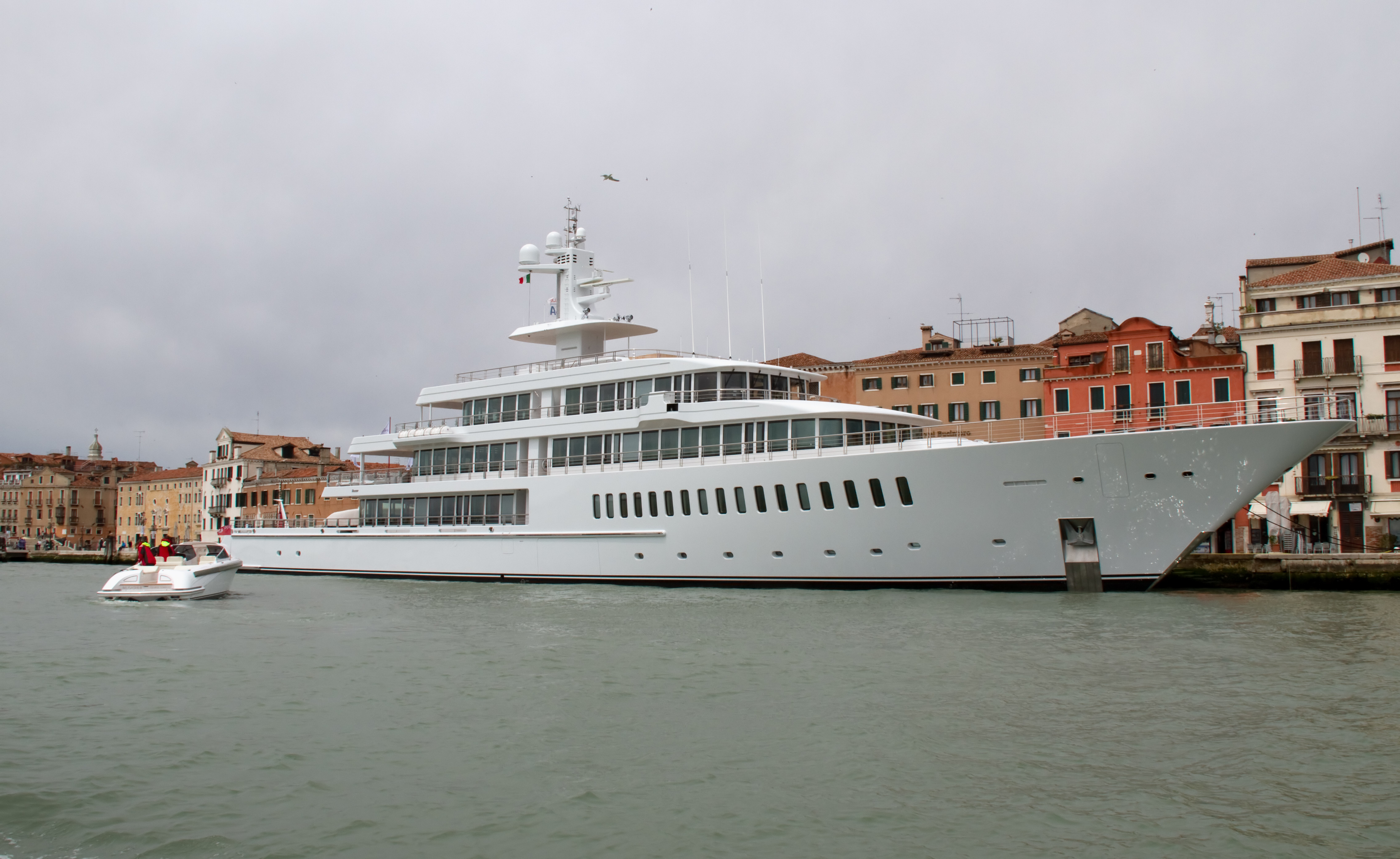 Musashi